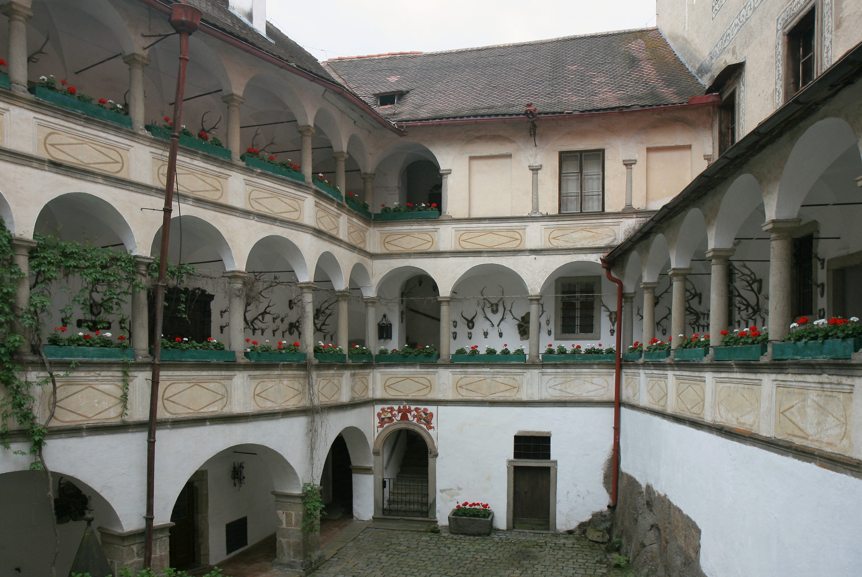 Dreistöckiger Arkadenhof (Schlosshof) der Burg Clam in Klam im Bezirk Perg in Oberösterreich.